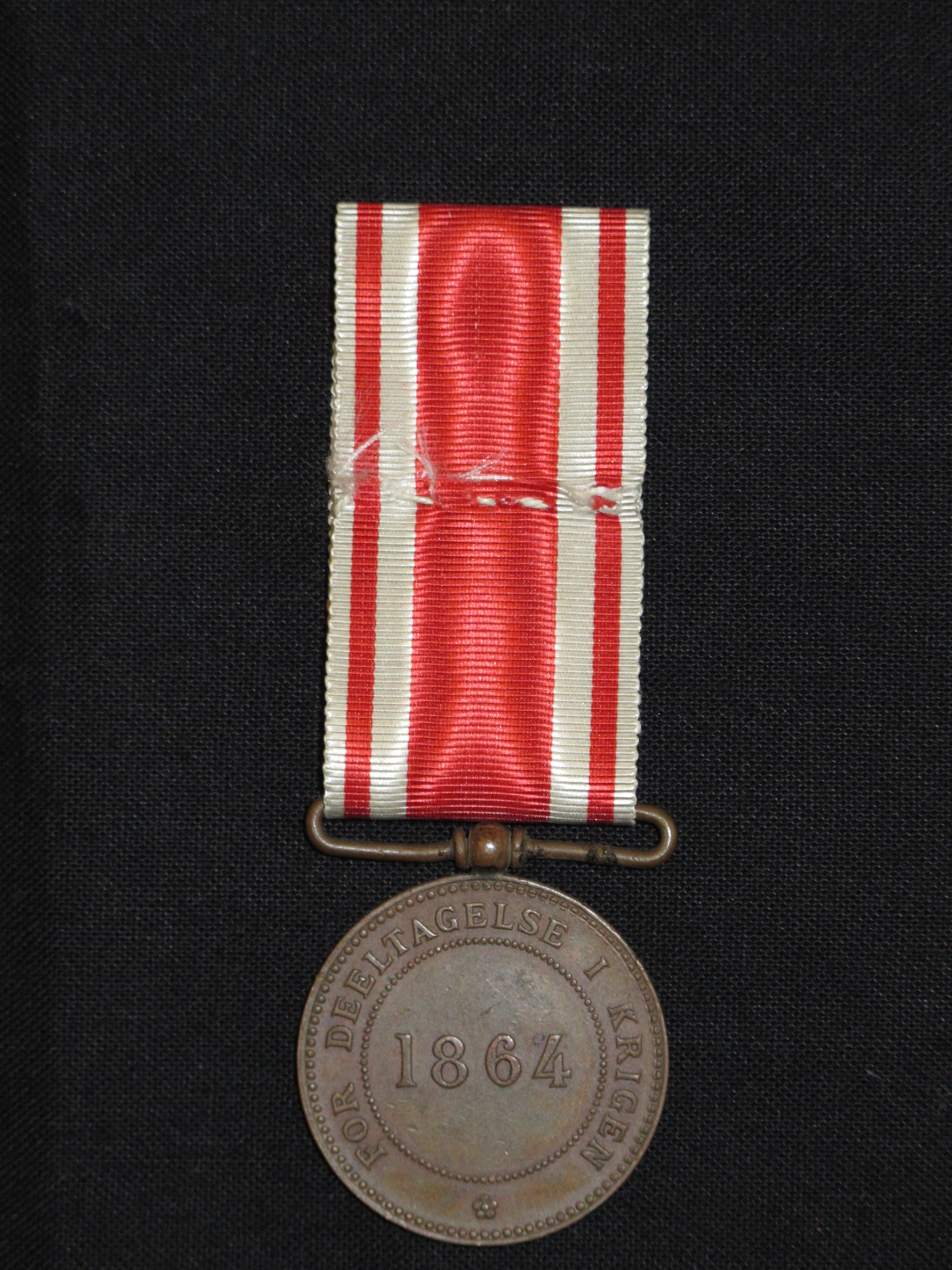 Erindringsmedalje for krigsdeltagelse i krigen 1864.